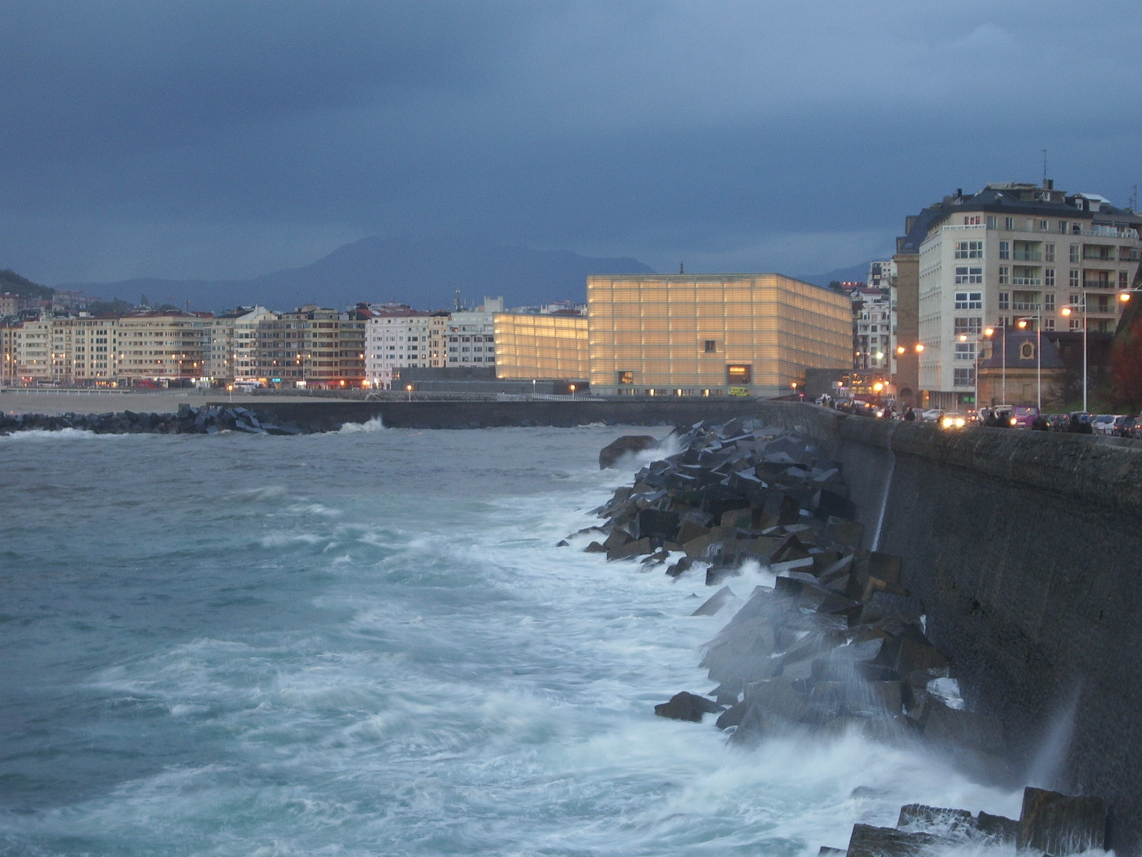 Donostiako Kursaal biltzar jauregia paseo berritik ikusia ilunabarrean. Nik neuk egina